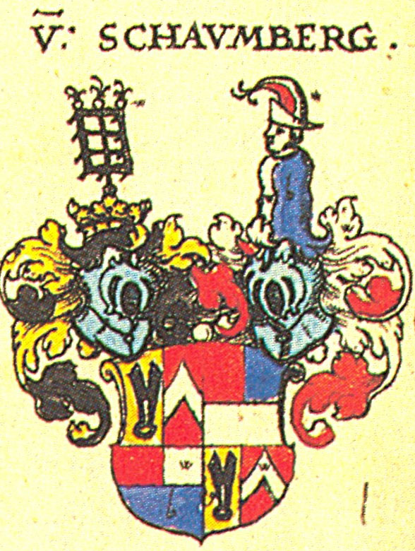 Wappen der Fränkischen Adelsfamilie Schaumburg